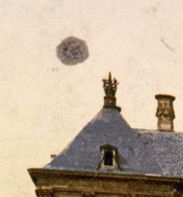 Voorbeeld van retoucheren. Afbeelding is een detail van File:Paleis op de dam 1900.jpg, wat een public domain foto is van het Library of Congress